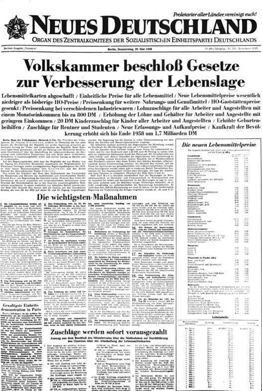 Abschaffung der Lebensmittelmarken, Artikel im Neuen Deutschland ADN-ZB 20.2.1978 DDR. Faksimile der Seite 1 des Neuen Deutschlands v. 29. Mai 1958 mit dem von der Volkskammer beschlossenen Gesetz zur Verbesserung der Lebenslage (u.a. Abschaffung der Lebensmittelkarten). Information added by Wikimedia users.